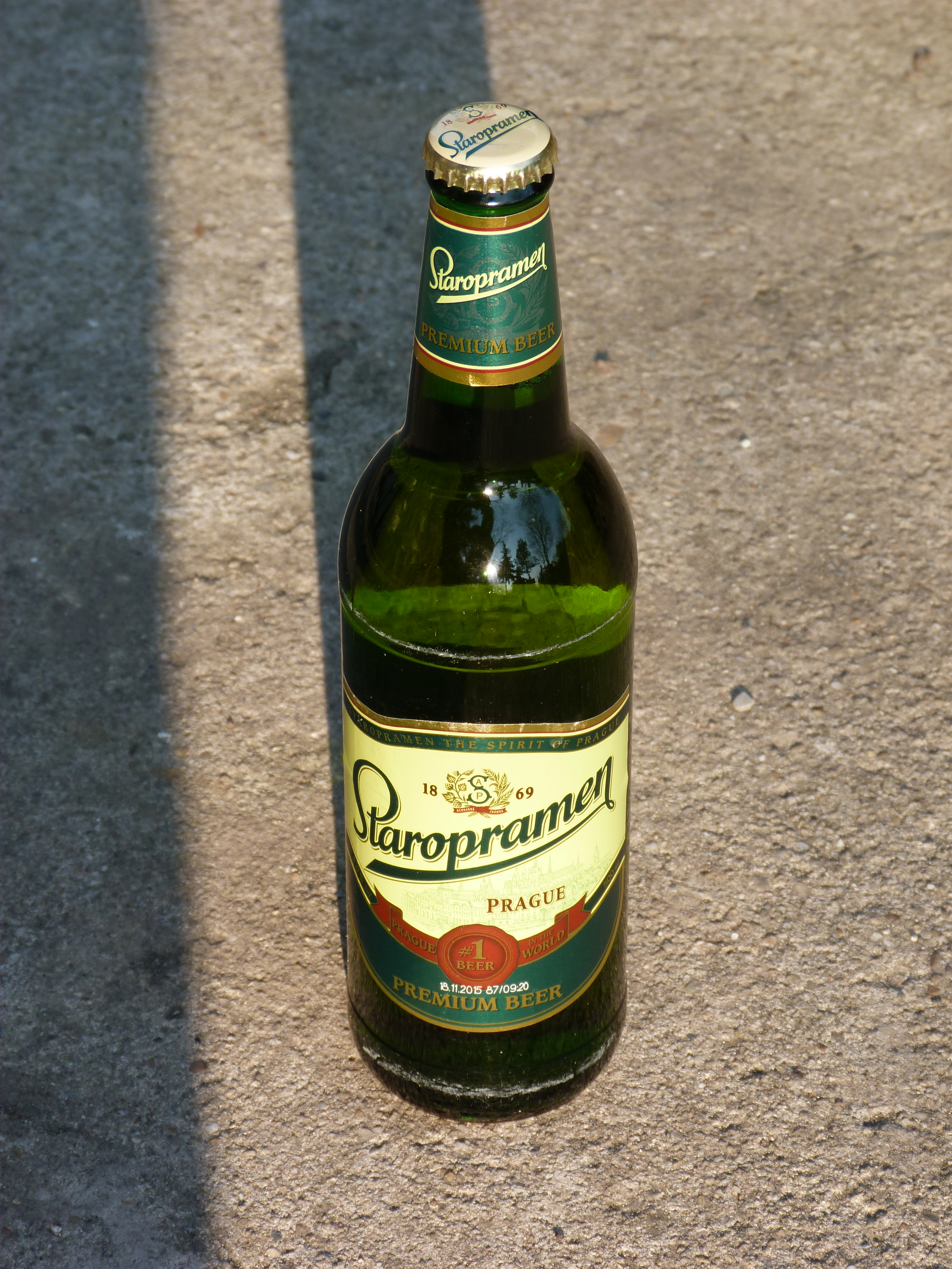 A felvétel 2015. március 21-én készült Budapesten. Staropramen sör. ©© Derzsi Elekes Andor, Budapest, 2015, A fénykép másolását és felhasználását a szerző ellenérték nélkül, jogutódjaira is kihatóan megengedi. Az engedély kiterjed a kereskedelmi célú hasznosításra is. Kéri azonban nevének feltüntetését a felhasználás során. A Metapolisz sorozat valamennyi képe és filmje Creative Commons alatti. kereskedelmi - for profit - célra is felhasználható. Ajánlott hivatkozás: Derzsi Elekes Andor: Metapolisz DVD line